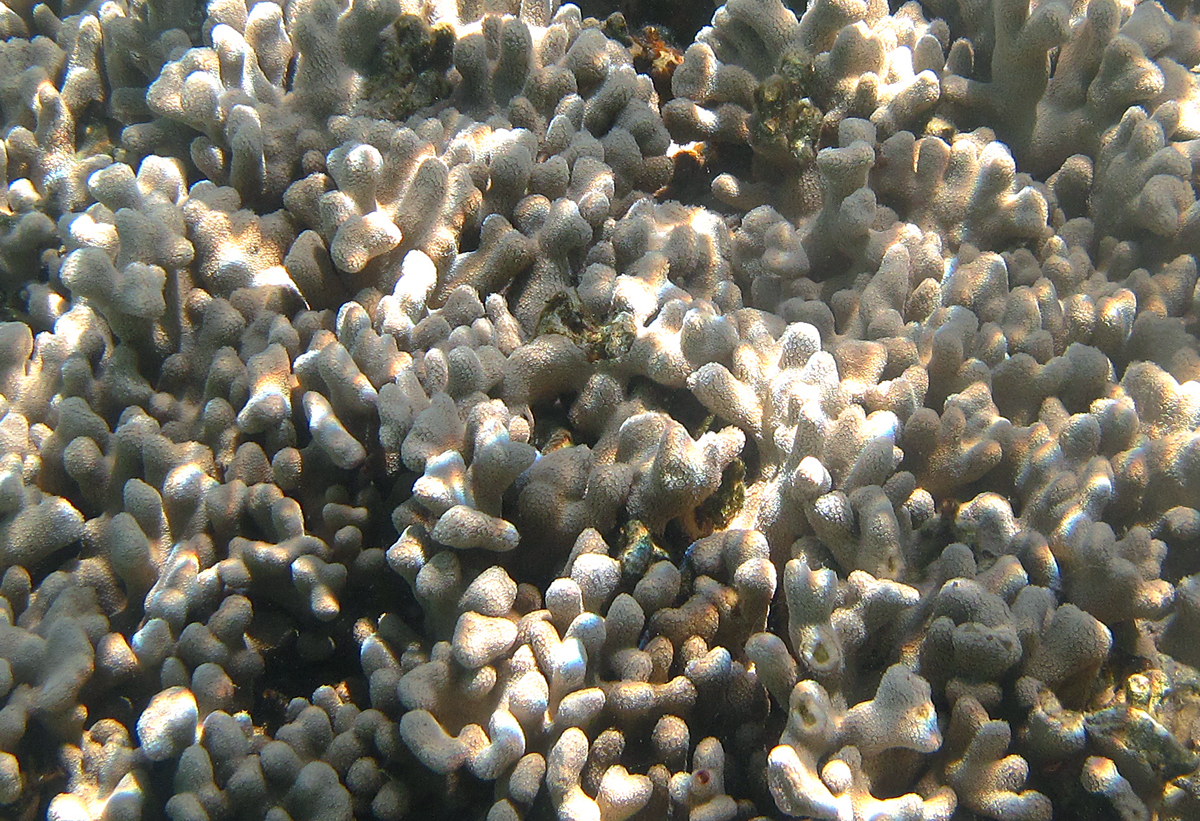 Corail Porites compressa à la Réunion.